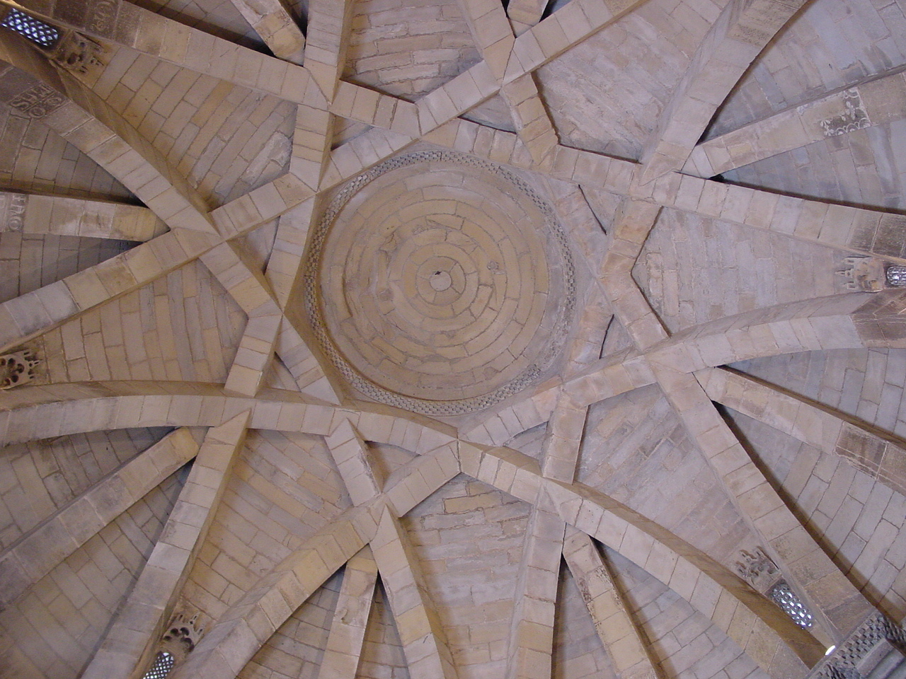 Bóveda de Torres del Río en Navarra (España). Bóveda de arcos entrecruzados de origen musulmán. Autor: Lourdes Cardenal, mayo de 2004.